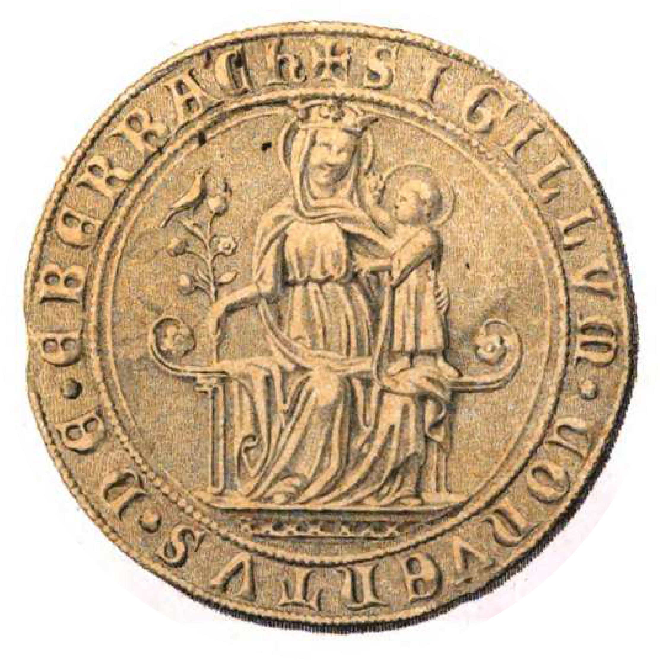 Konventssiegel des Klosters Eberbach, Rheingau, Hessen, Deutschland von 1332-1803, Das Siegel zeigt die Klosterpatronin Maria mit Jesuskind